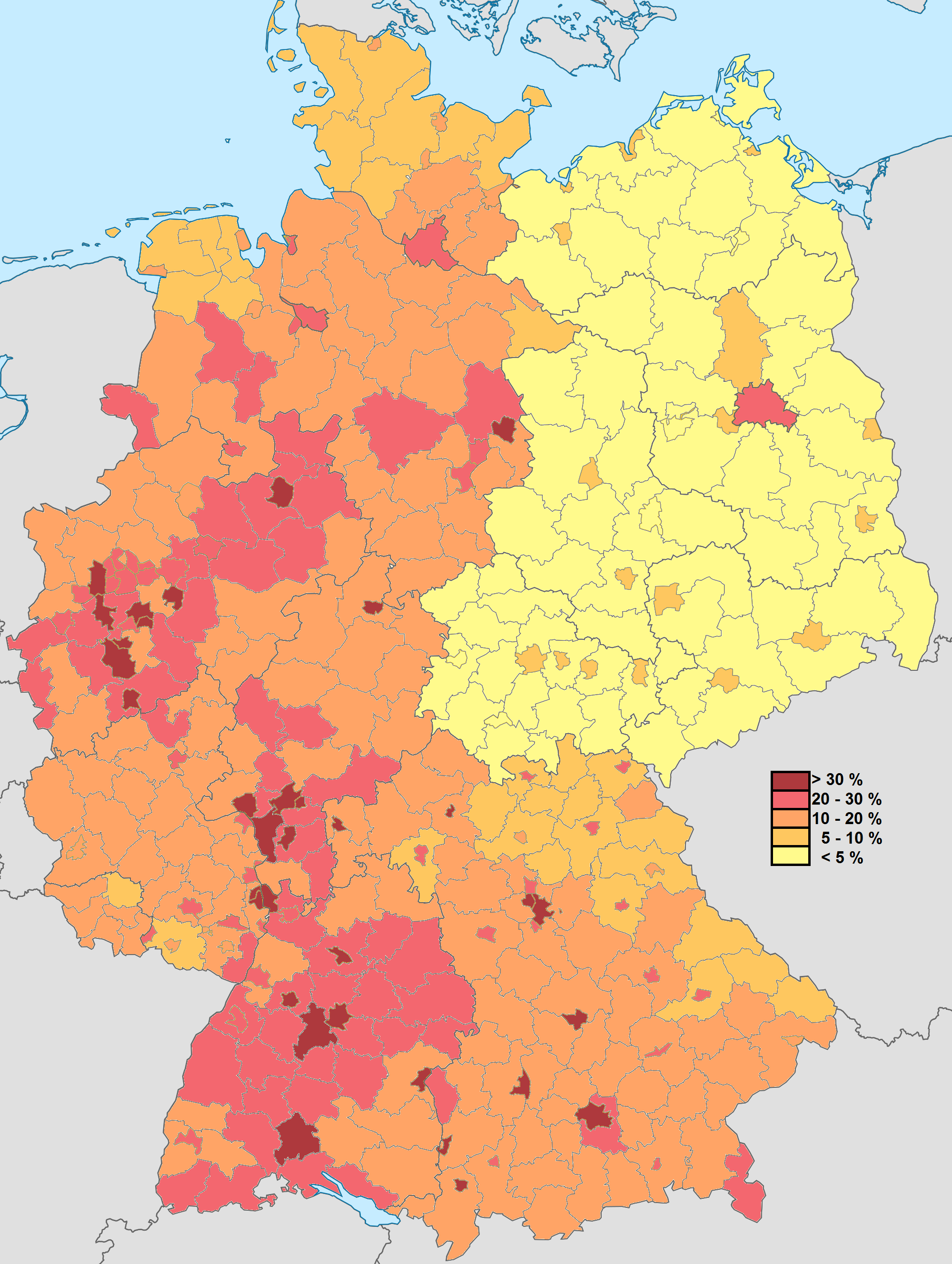 Anteil der Bevölkerung mit Migrationshintergrund nach Ergebnissen des Zensus 2011 auf Kreisebene.